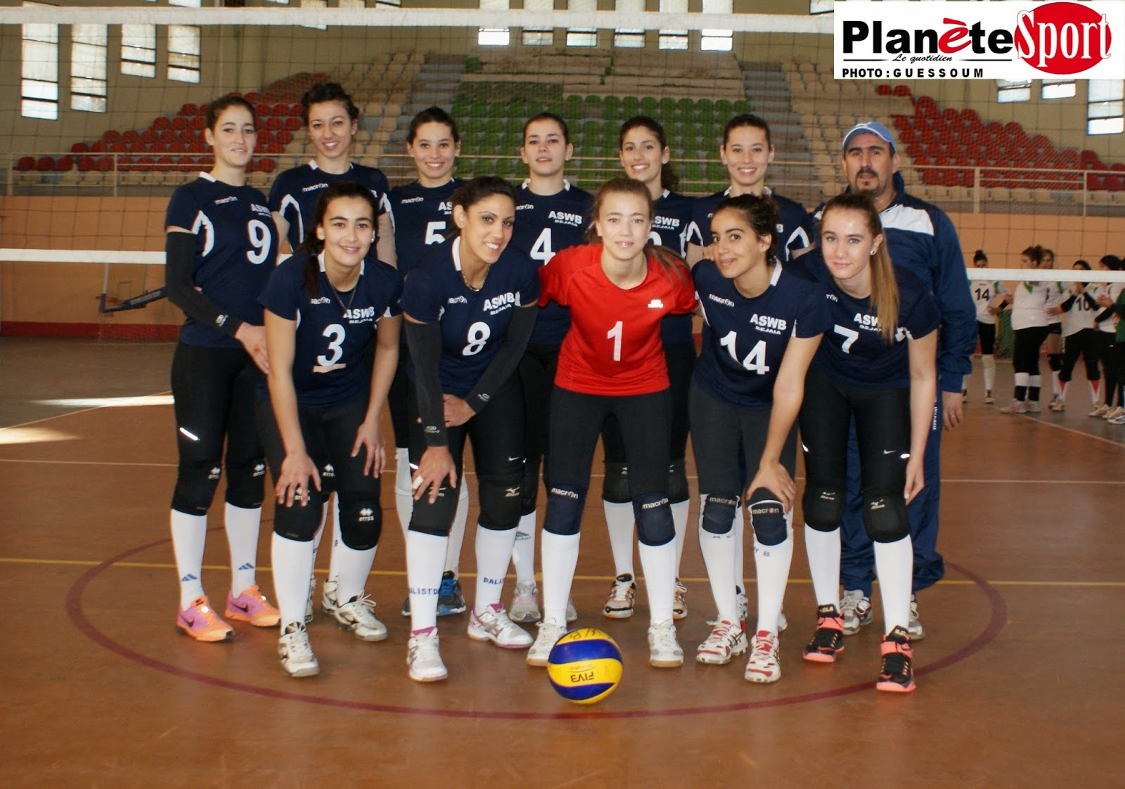 ياسمين أوصالح